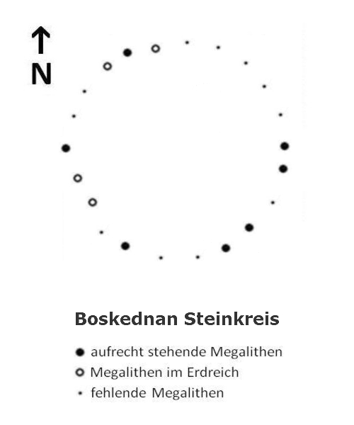 Boskednan Stone Circle